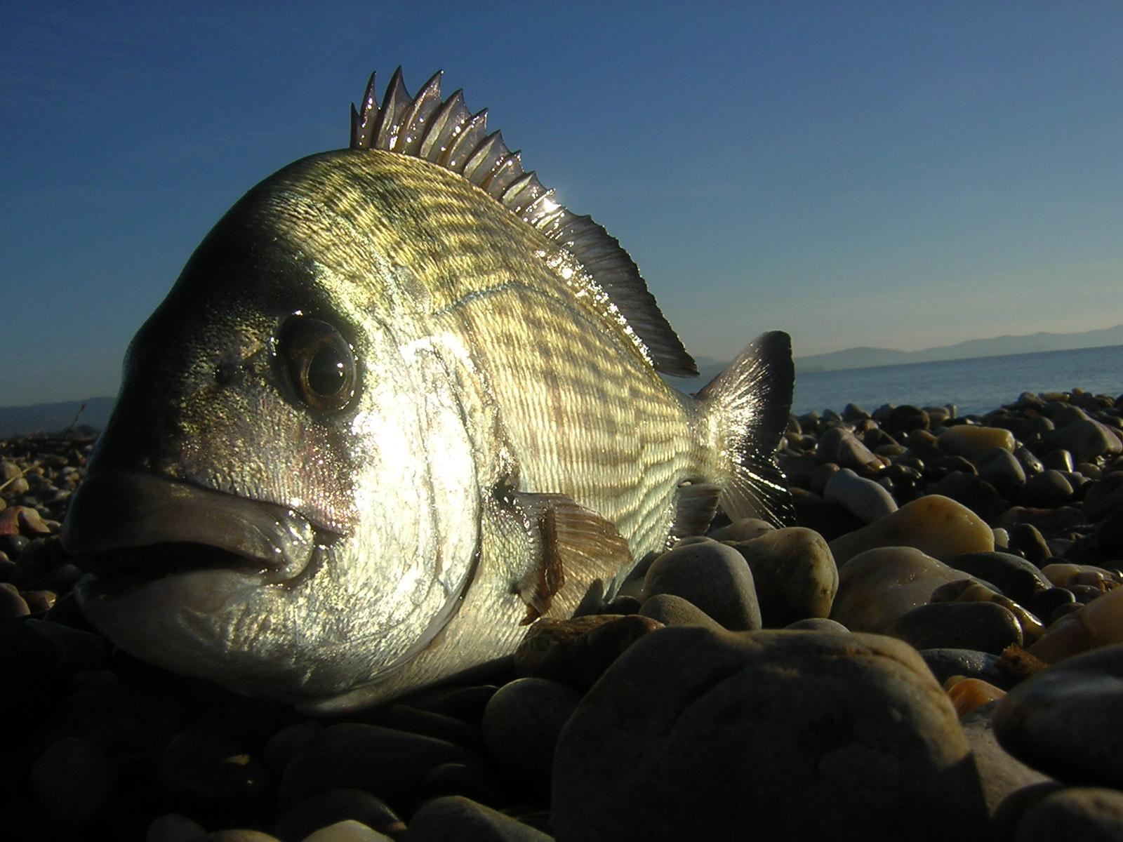 Sar commun